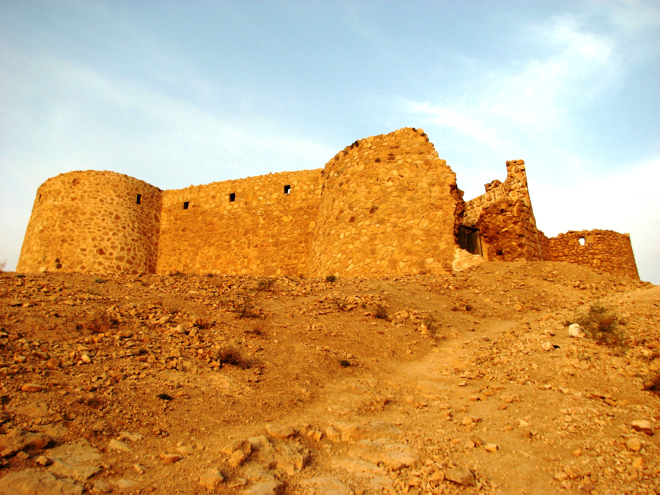 Jalaaledin Castle near Jajarm, 2008